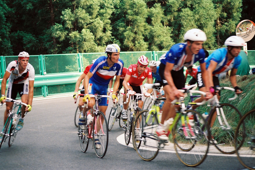 Richard Virenque et Laurent Dufaux, lors de la course en ligne amateur des championnats du monde de cyclisme de 1990.